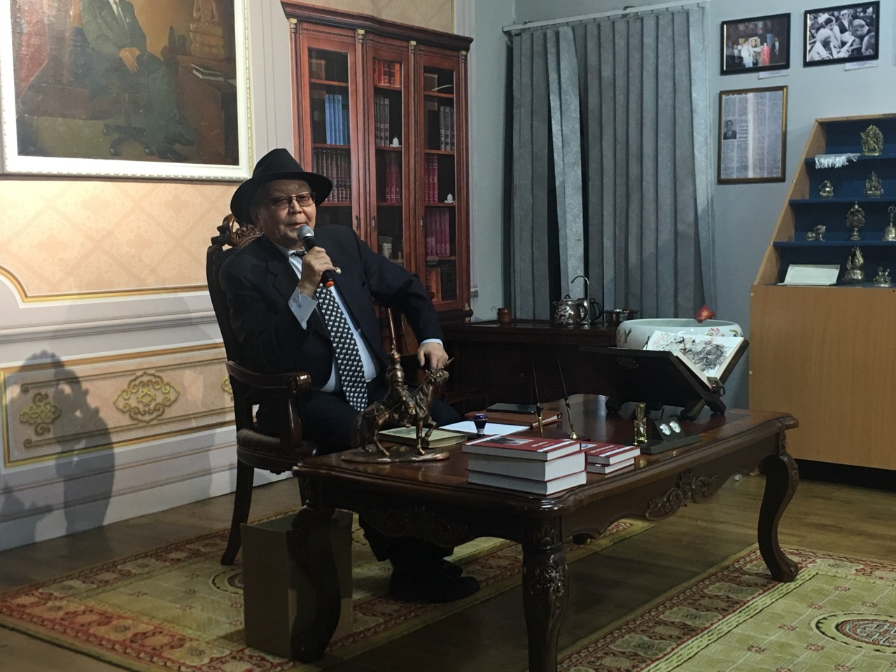 Бичелдей К.А. во время встречи со студентами, посвященная 70-летию со дня рождения. Кызыл, 06.02.2020